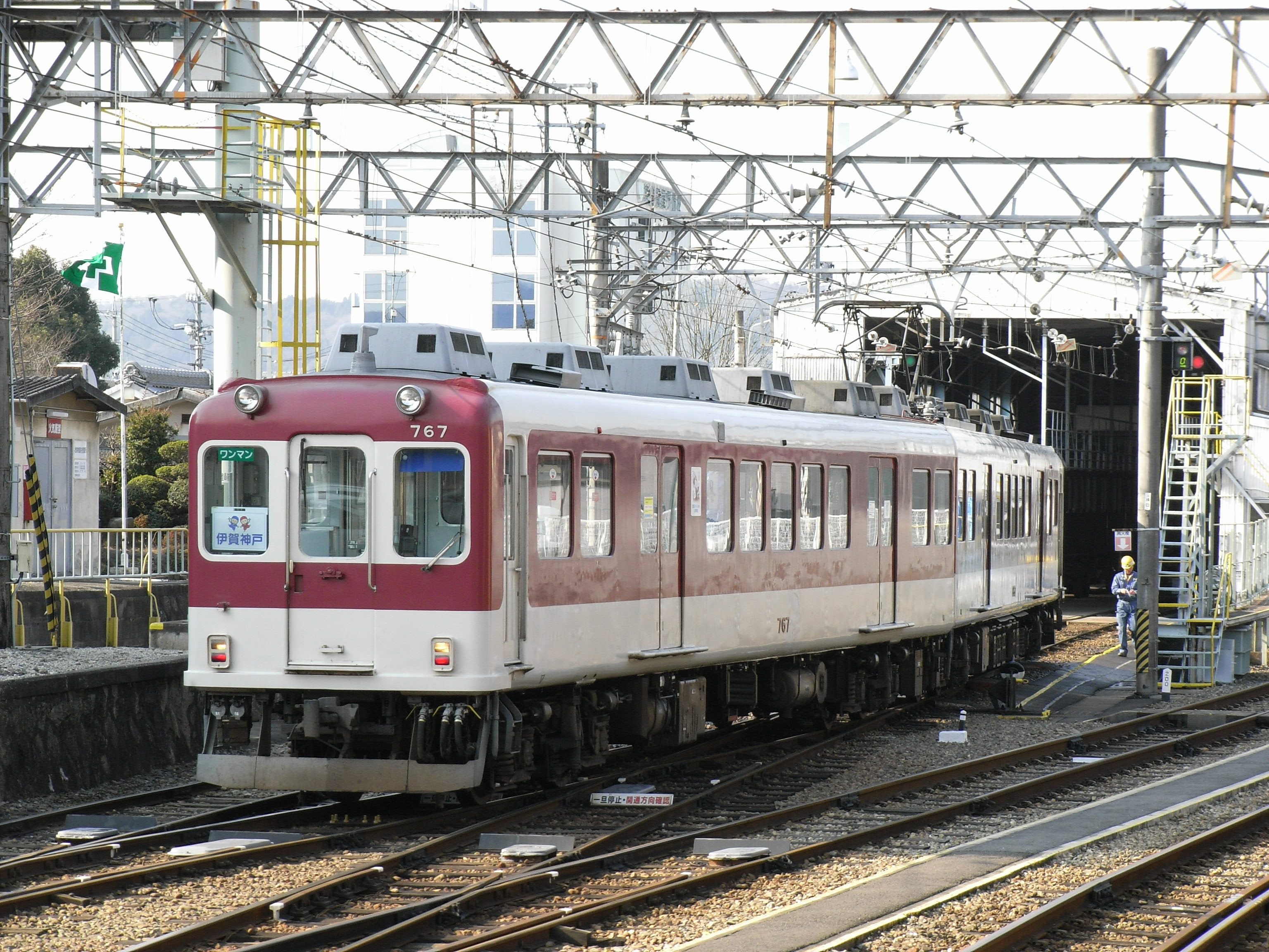 伊賀鉄道@上野市駅